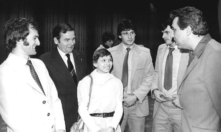 ADN-ZB Mittelstädt 14.12.80 Berlin: Auszeichnung "DDR-Sportler des Jahres 1980"-Zu einem herzlichen Gespräch nach der Ausezichnung im "Palasthotel" kam es zwischen Egon Krenz, Kandidat des Politbüros des ZK der SED und 1. Sekretär des FDJ-Zentralrates (R.), dem Präsidenten des DTSB der DDR, Manfred Ewald, (2.v.l.) und der "DDR-Sportlerin des Jahres 1980", Turn-Olympiasiegerin Maxi Gnauck (3.v.l.), dem "DDR-Sportler des Jahres 1980", Marathon-Olympiasieger Waldemar Cierpinski (l.) und den Mitgliedern der "DDR-Mannschaft des Jahres 1980", dem Olympiasieger im Handball, Rainer Höft (4.v.l.) und Siegfried Voigt (2.v.r.).